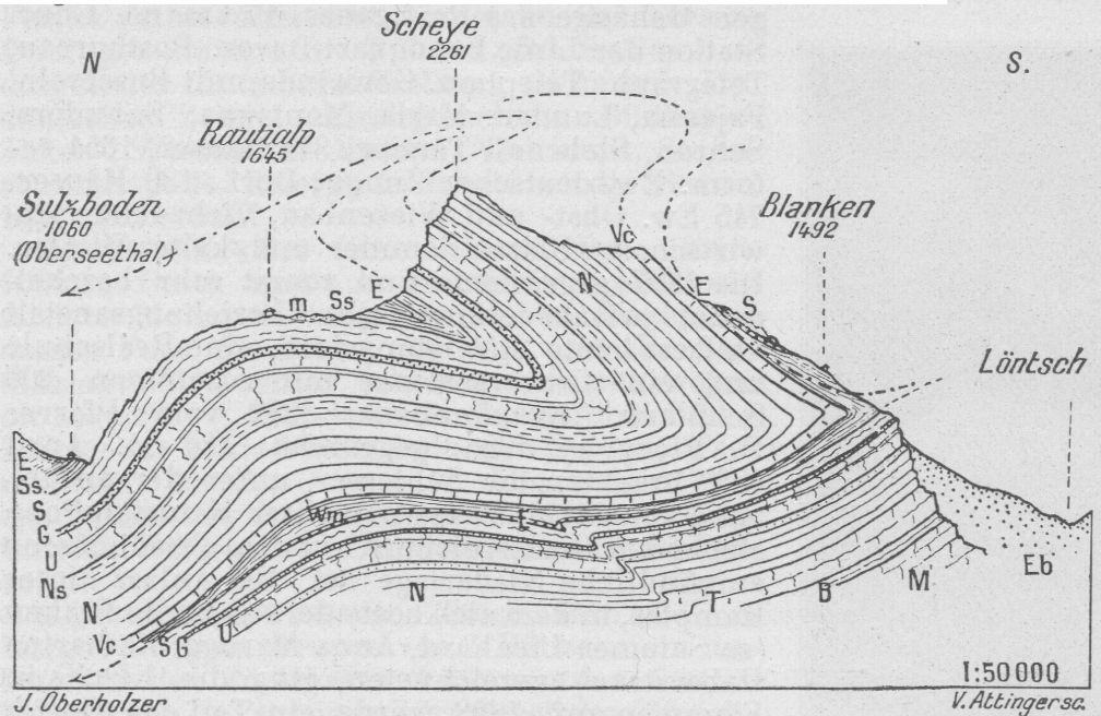 geologisches Querprofil durch die Scheye / Schijen